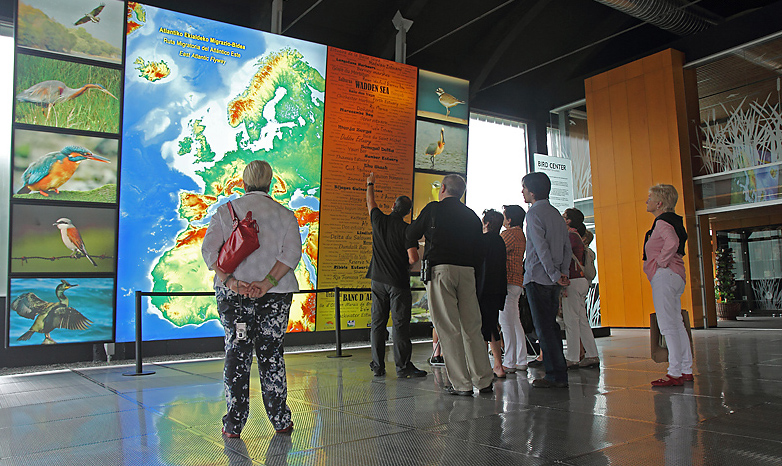 Equipamiento de Urdaibai Bird Center. Mapa de la migración.